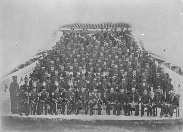 Foto. Groepsportret van de Sultan van Siak met zijn gevolg